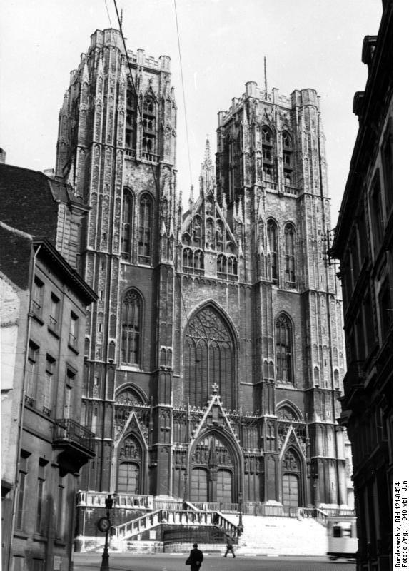 Brüssel 1940, unversehrte Kathedrale